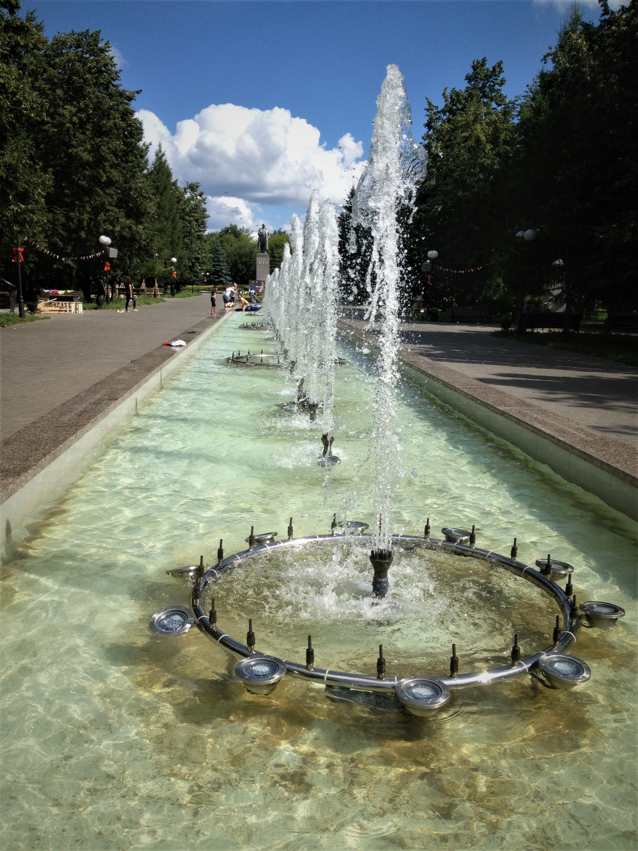 Фонтан в Парке "Крылья Советов" (г. Казань).